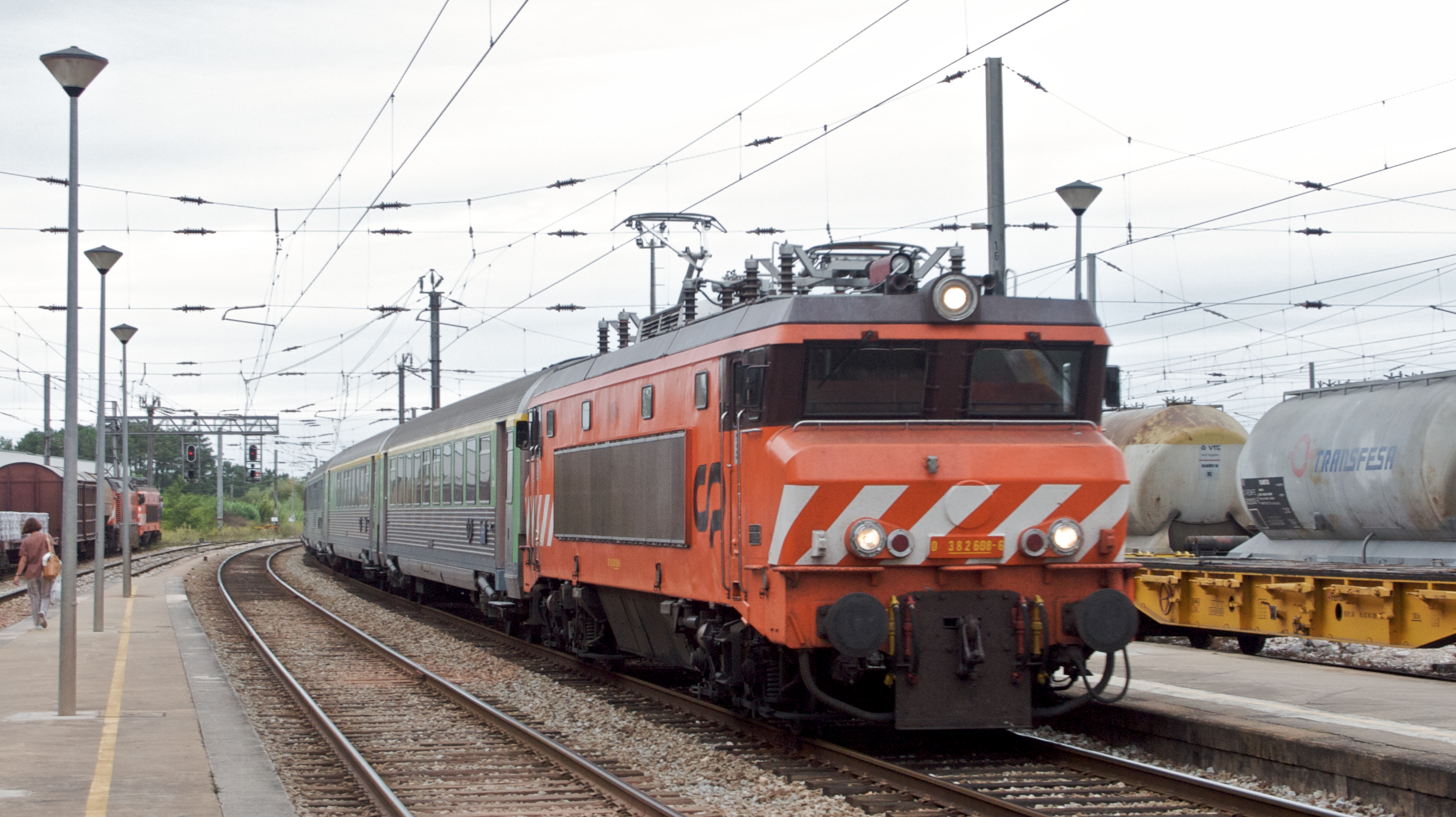 Tipo: Comboio Intercidades 528 [Porto • Campanhã - Lisboa • Santa Apolónia] Local: Estação da Pampilhosa [Linha do Norte , PK 231 • Linha da Beira Alta , PK 50] Data e hora: 3 de Setembro de 2008 [18h01] Material: Locomotiva 2608 + 6 carruagens Corail